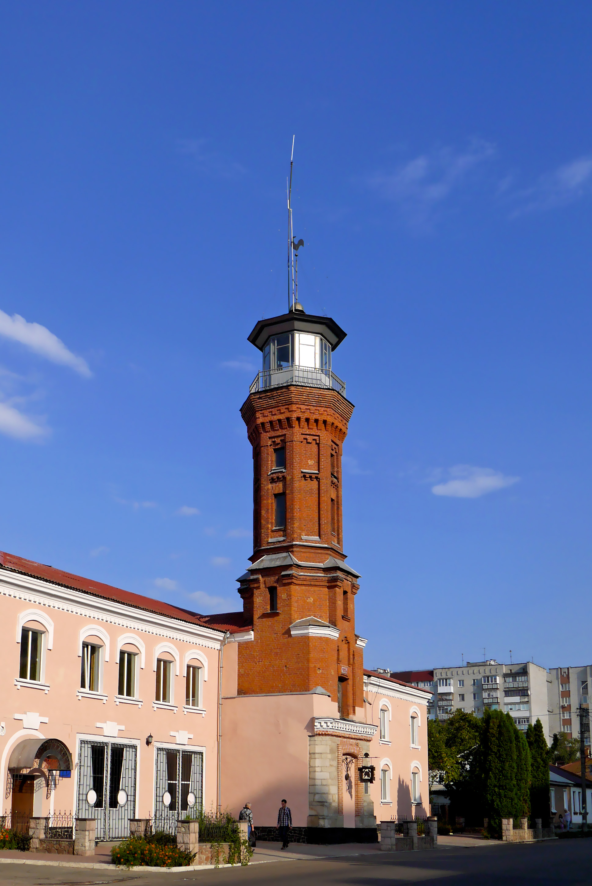 Пожежна вежа, Житомир, вулиця Святослава Ріхтера, 33